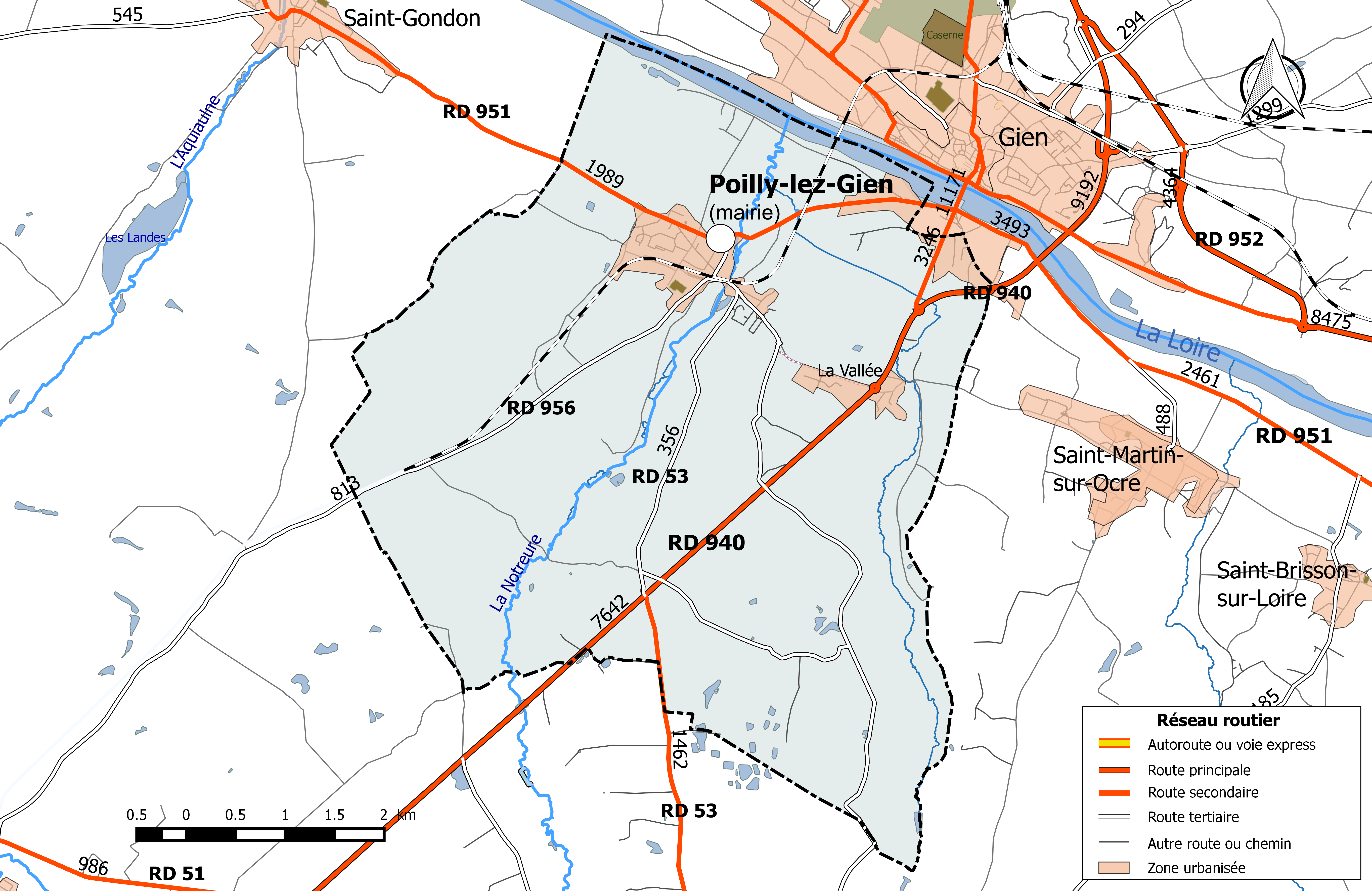 Carte du réseau routier de la commune de Poilly-lez-Gien.